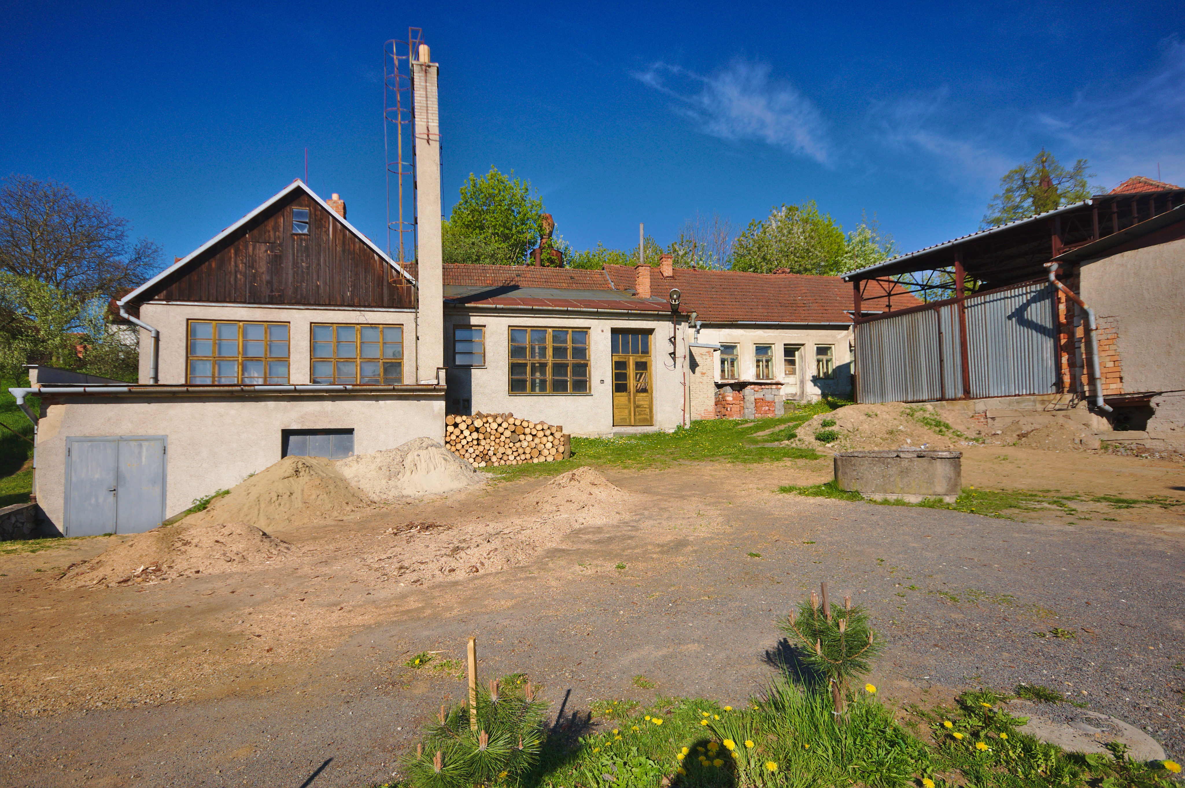 Bývalá truhlářská dílna, Lipová, okres Prostějov